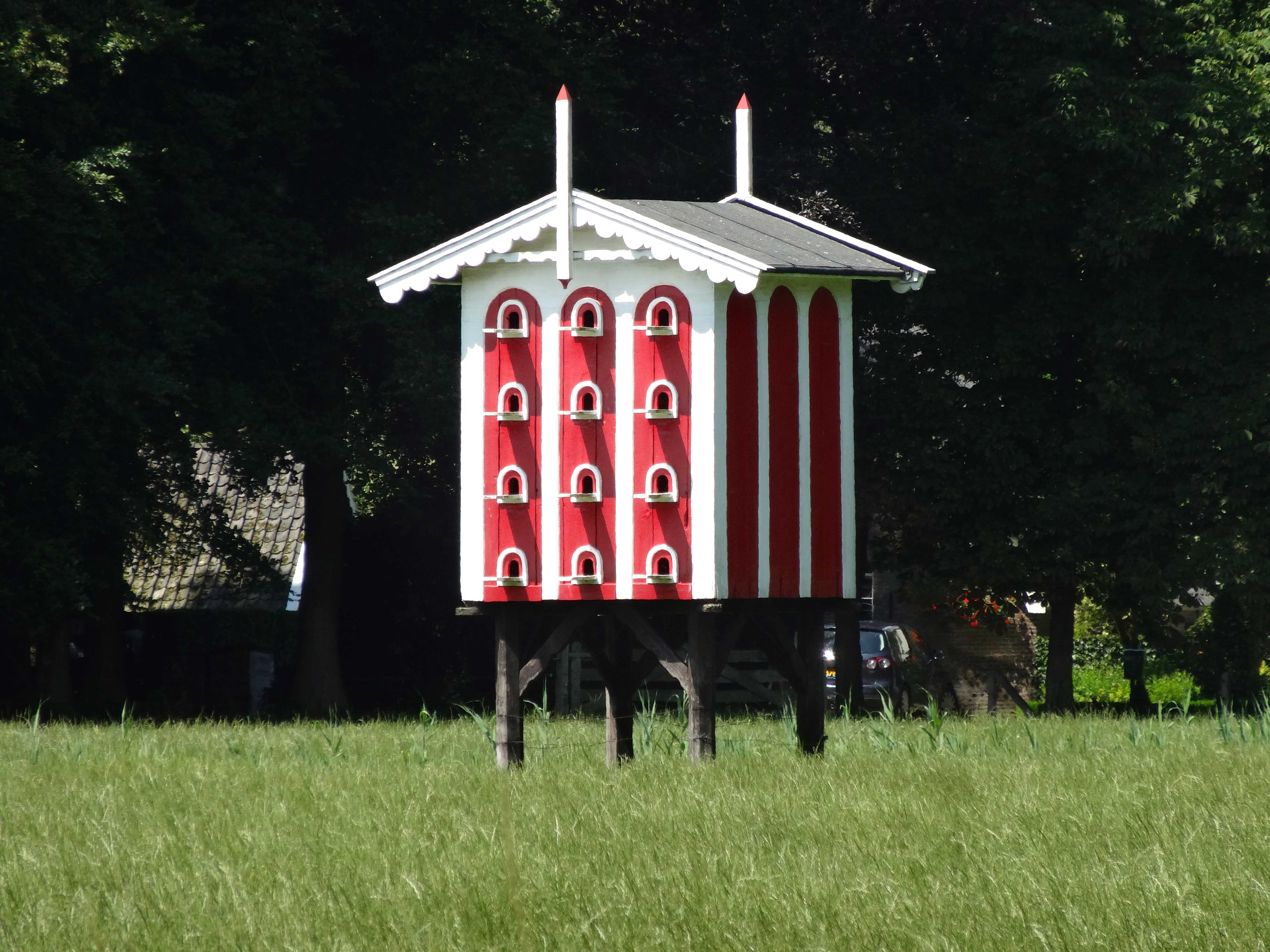 Duiventil van het Huis 't Rozendael in Heino met de kleuren van de familie Van Ittersum